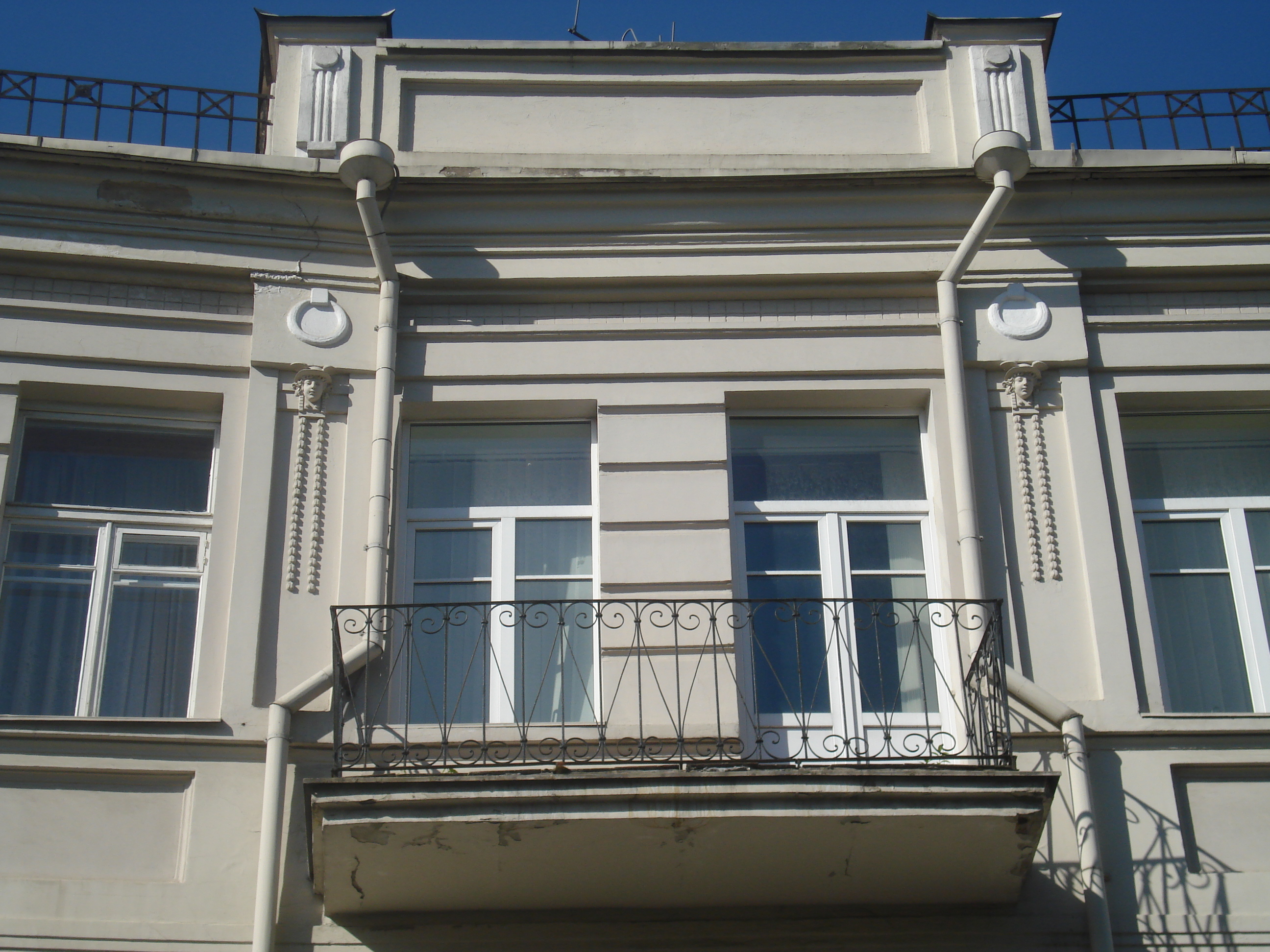 House in Vokiečių street in Vilnius (Vokiečių g. 12)